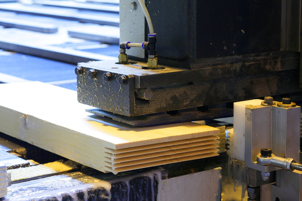 Линия сращивания и зарезки шипового соединения клееного бруса. Сокольский ДОК, Россия